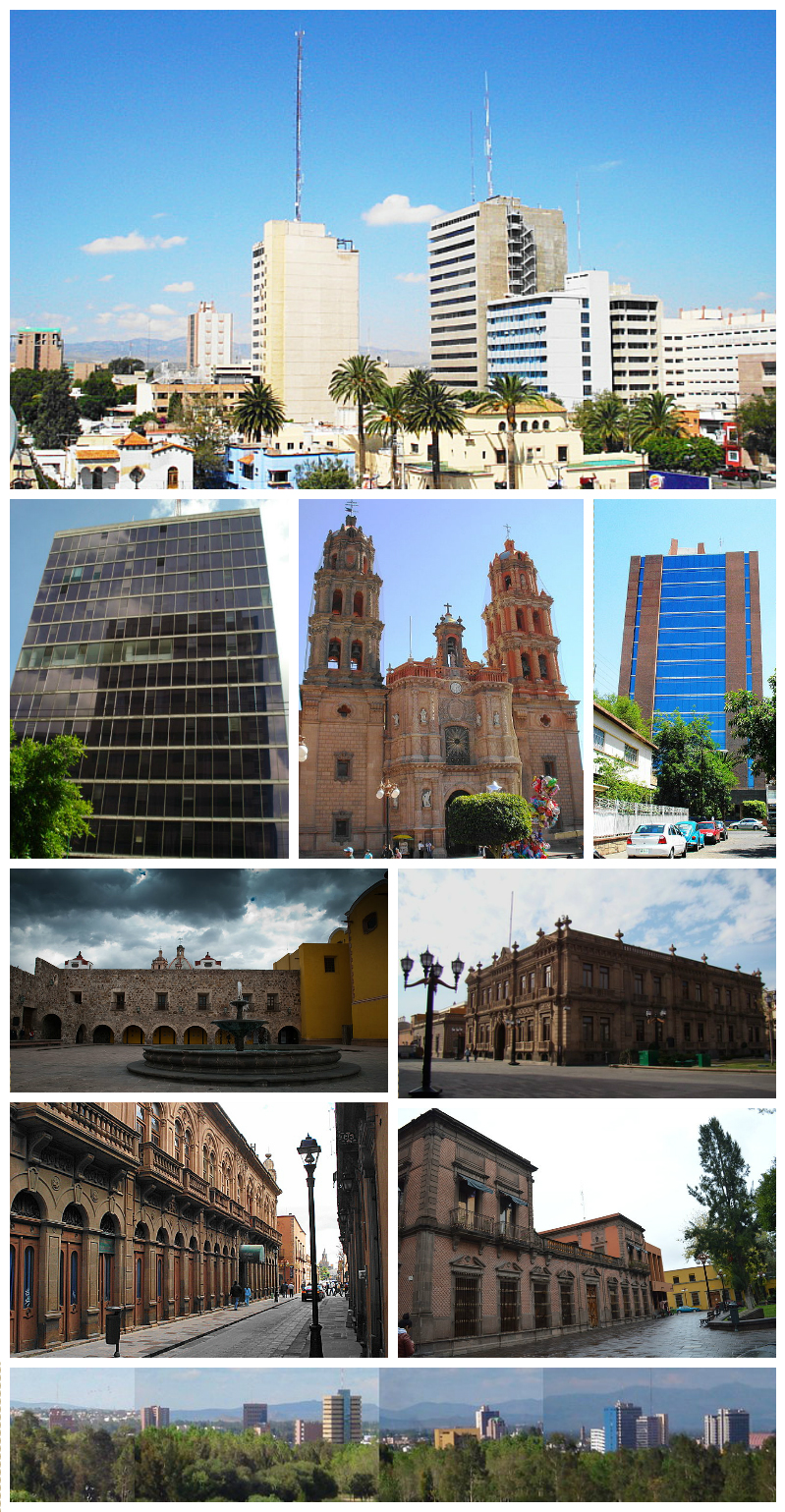 San Luis Potosí (San Luis Potosí)|San Luis Potosí (San Luis Potosí)